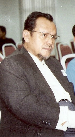 фото малайзийского поэта Кемалы